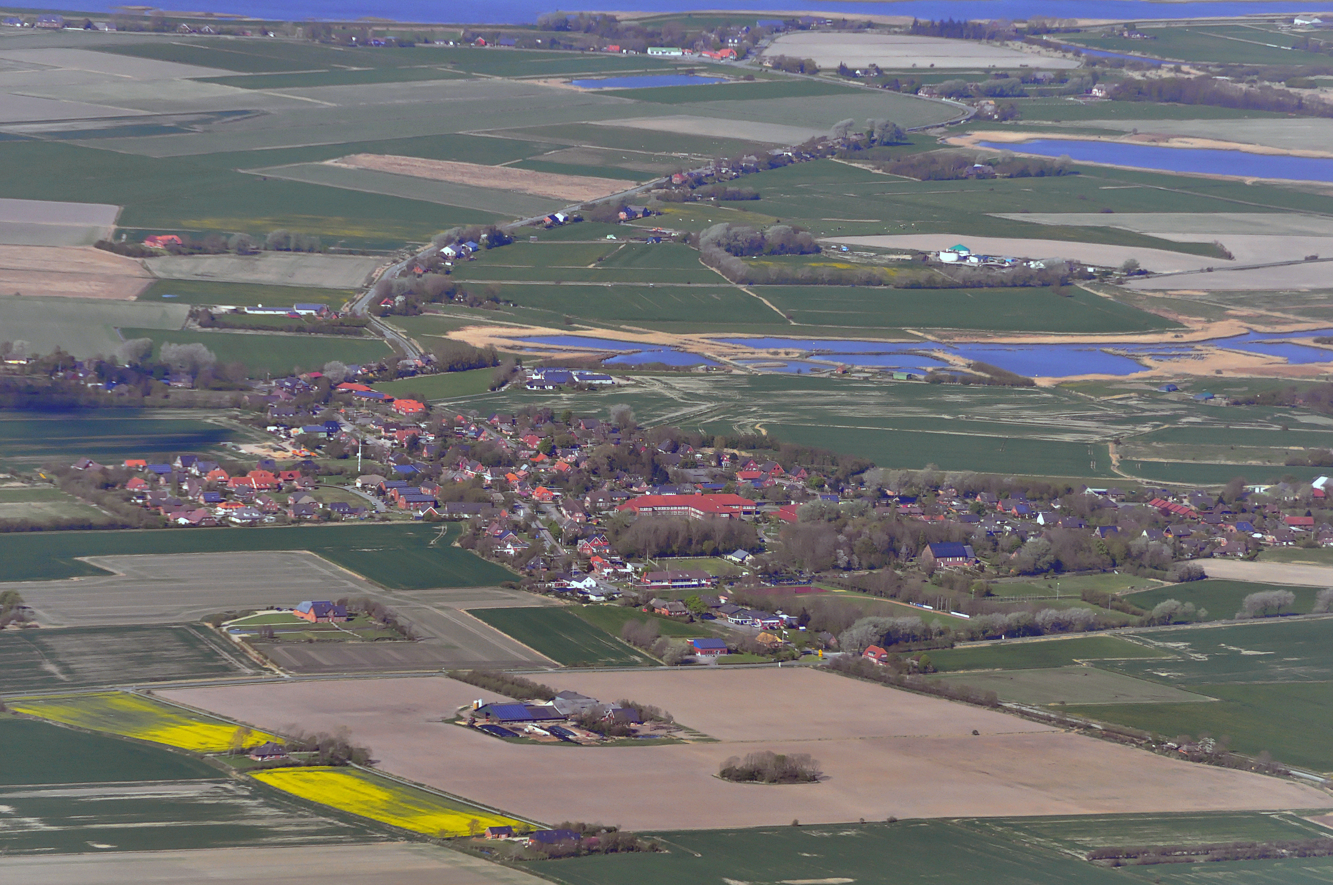 Luftbilder von der Nordseeküste 2012-05